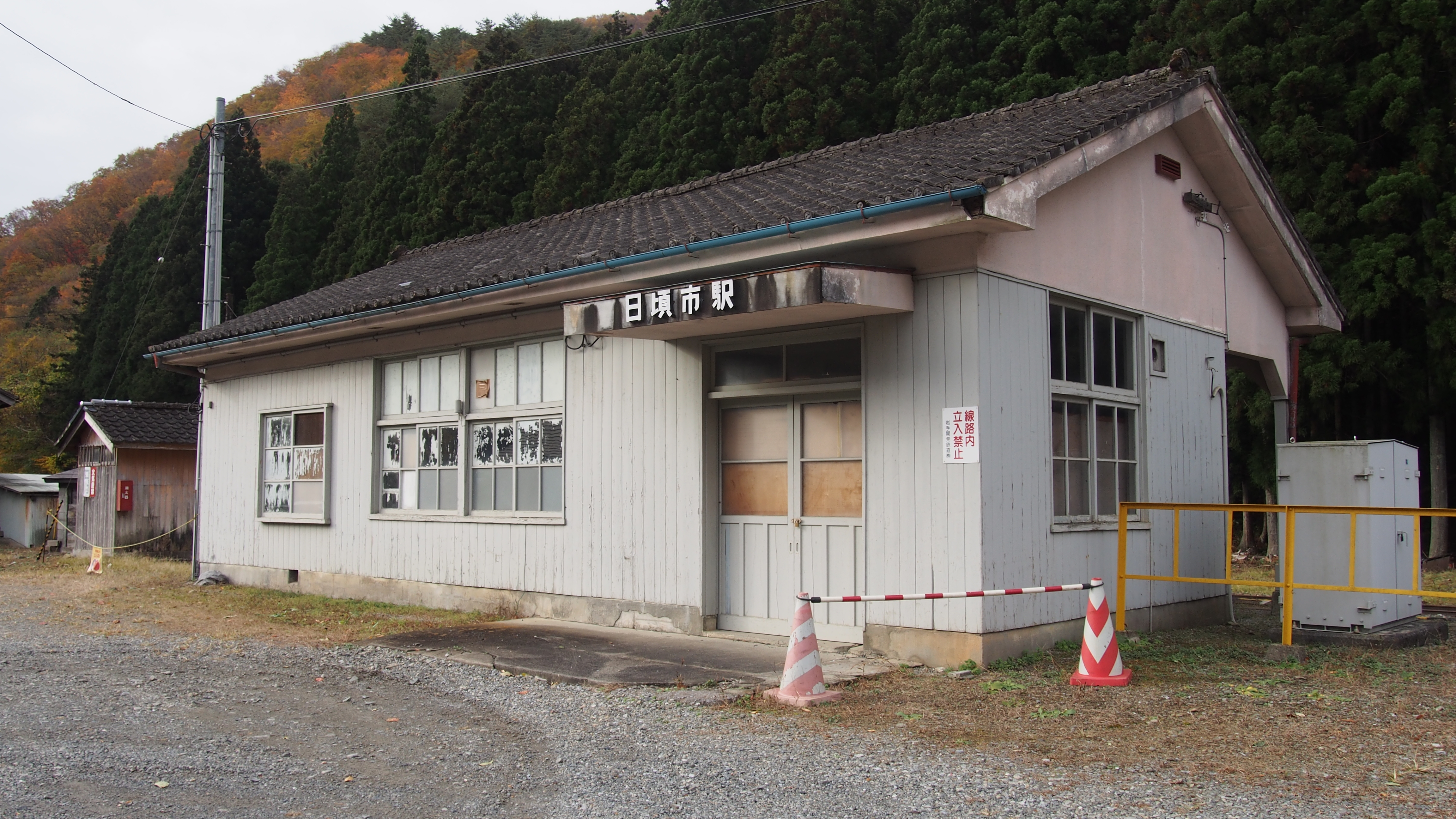 岩手開発鉄道